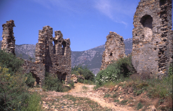 Naula ruins, Mahmutlar, Turkey